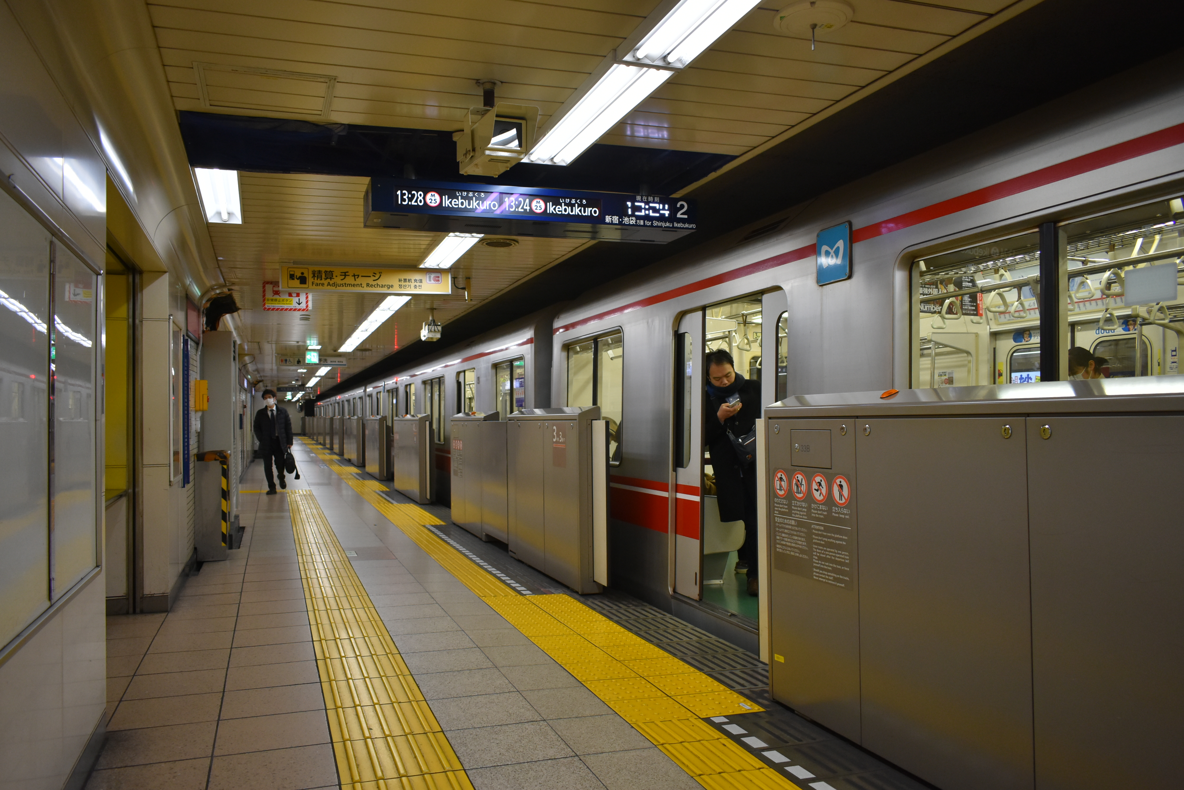 東京メトロ 東高円寺駅 Nikon D3400